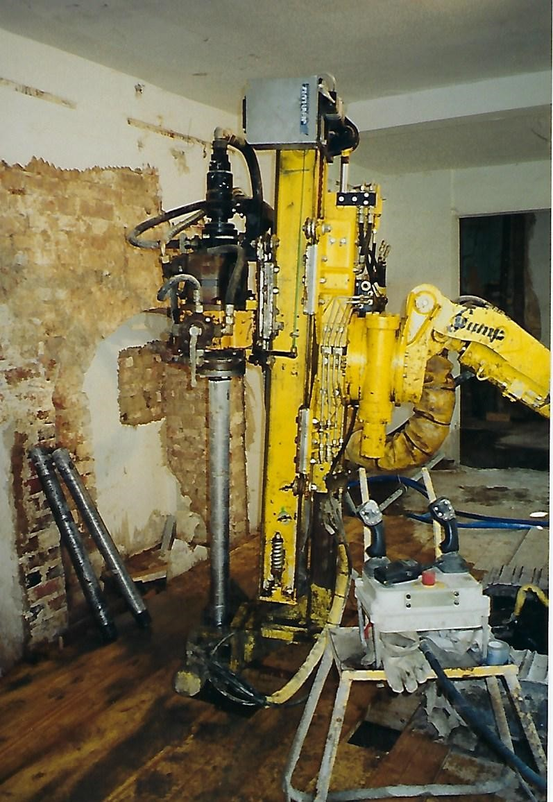 Bodensanierung des Kreuzgangs im Refektorium des Klosters Dobbertin. Im Düsenstrahlverfahren der Berliner Fa. Stump werden mit einem Druck von 420 bar Zement-Suspensionen mit extrem energiereicher Strahlwirkung in den Boden eingebracht. Durch die Fräswirkung des Schneidstrahls entstehen säulenförmige Betonkörper. Sie haben einen Durchmesser von etwa 80 cm und reichen 2–3 m tief in den Boden.